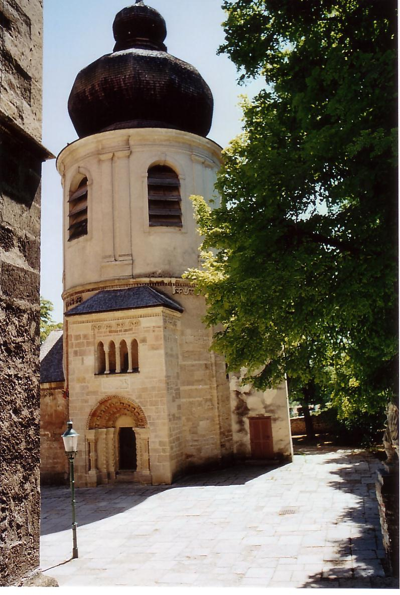 Bauwerke: Romanischer Karner in Mödling.